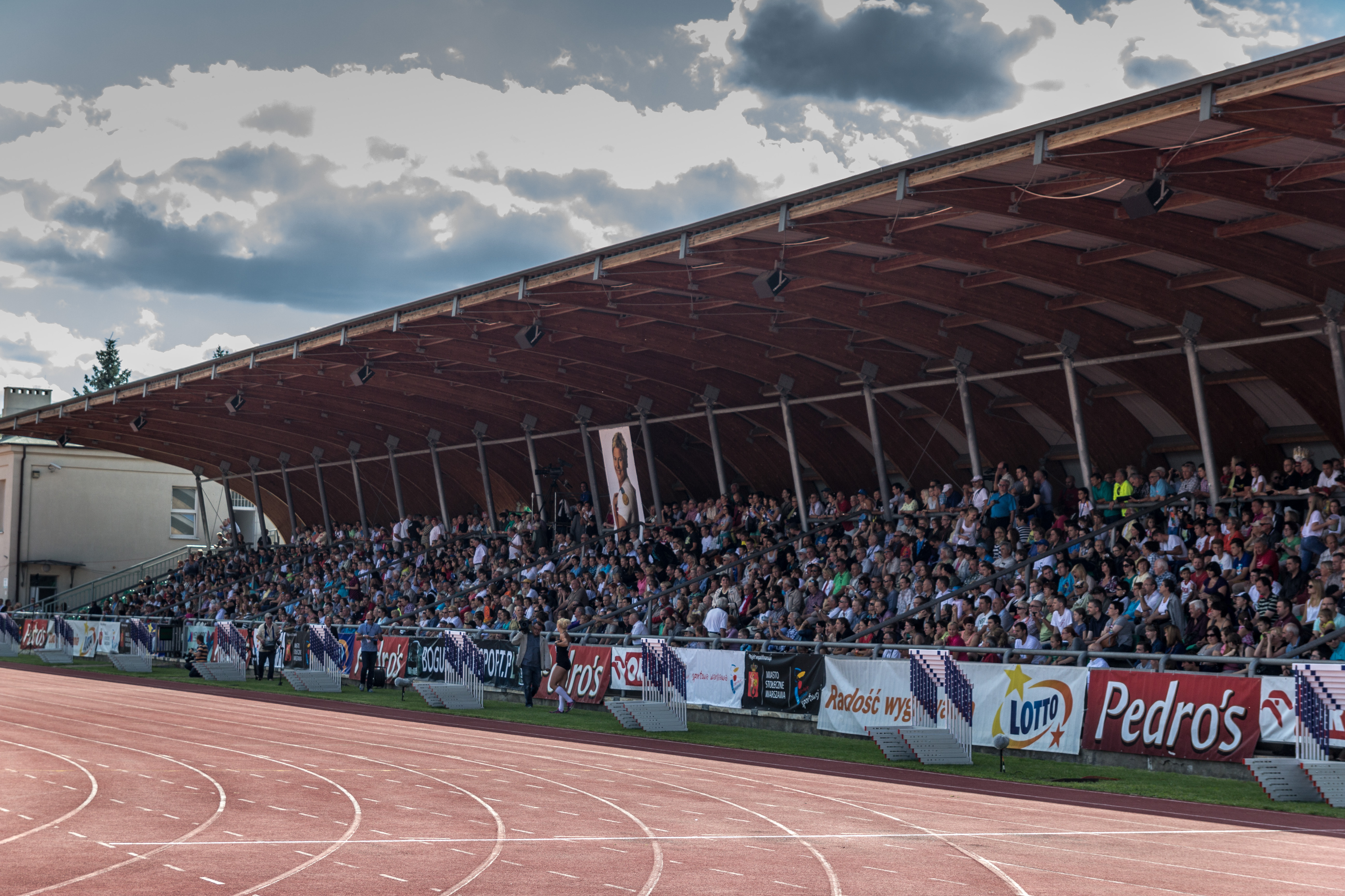 Memoriał Kamili Skolimowskiej w Warszawie, 2013-08-25